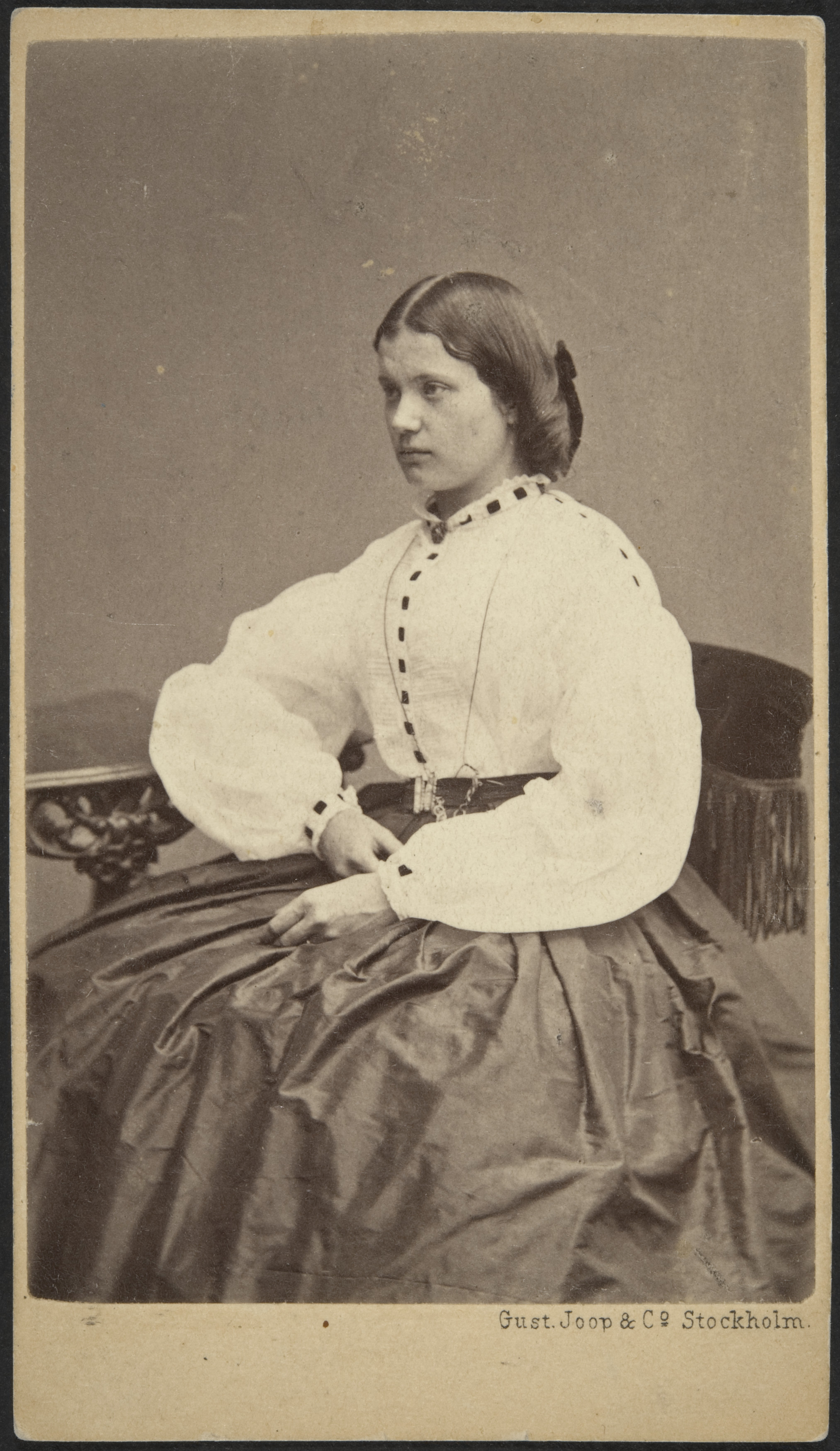 Anna Edelheim, tuleva kirjailija ja toimittaja; pysty, mustavalkoinen